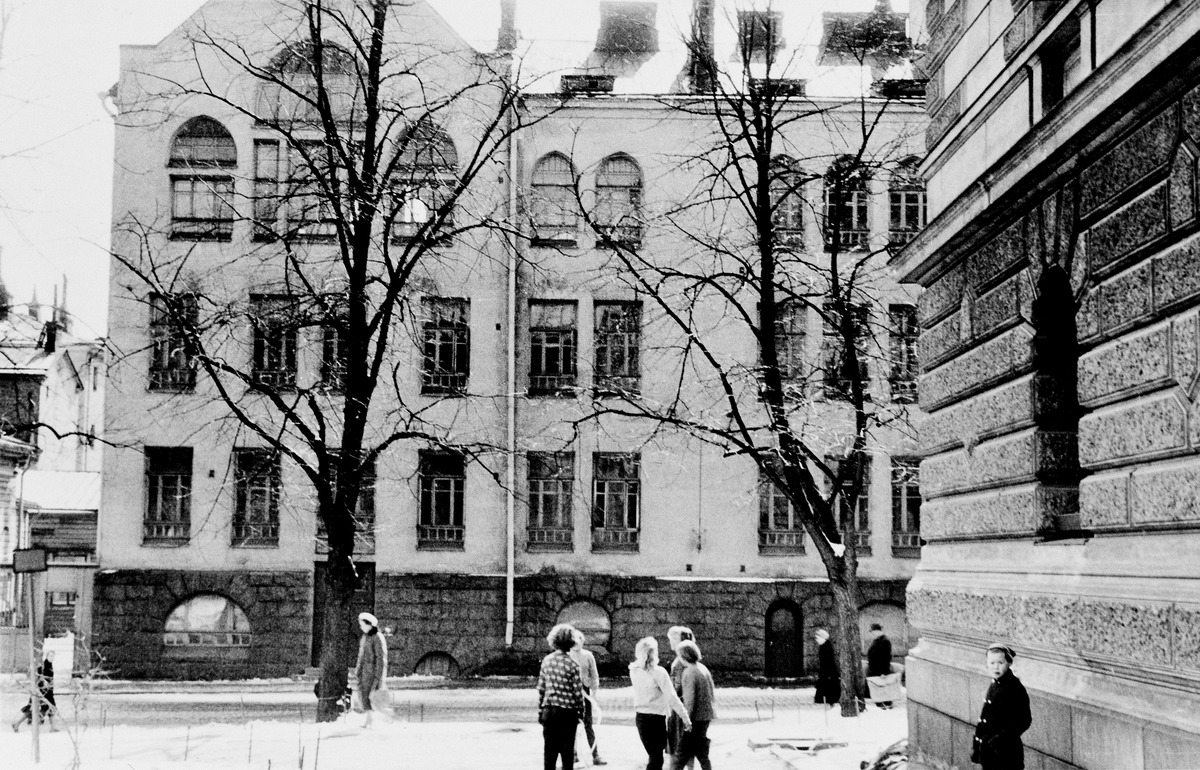 Helsingin Uusi yhteiskoulu, Kirkkokatu 12.